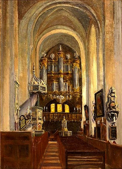 Paul Burmeister: Arp-Schnitger-Orgel im Dom zu Lübeck, Öl auf Leinwand